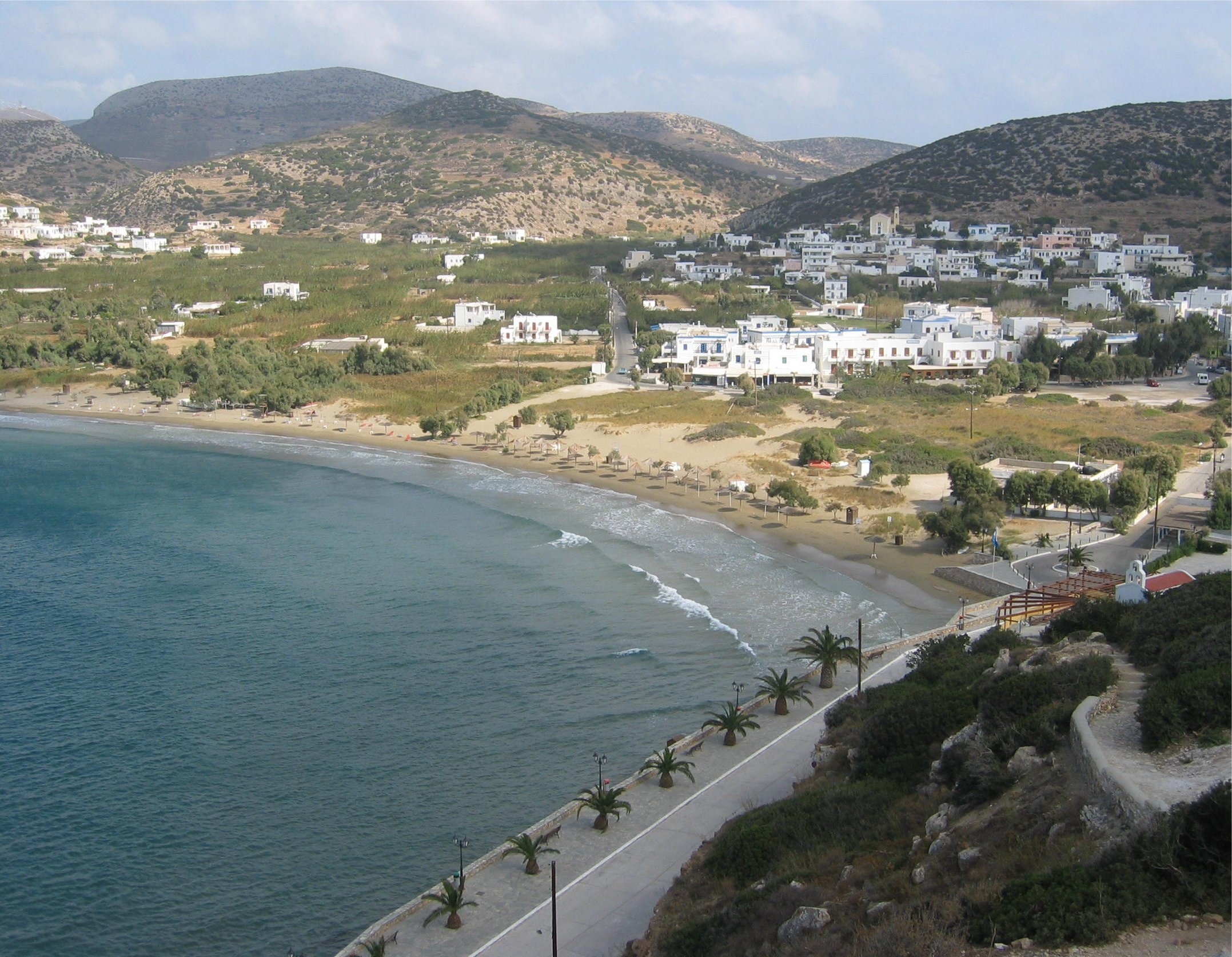 Stranda ved Gallissas.